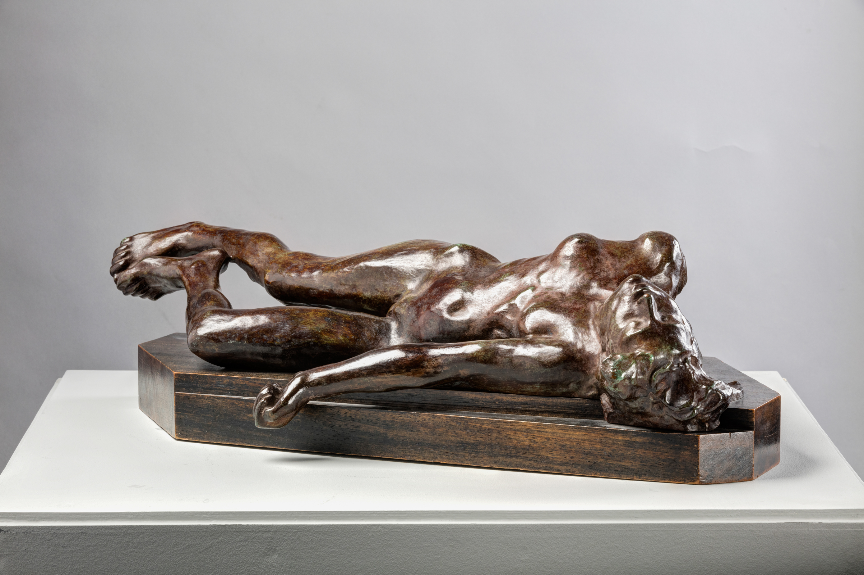 La era de Rodin Colección Museo Soumaya